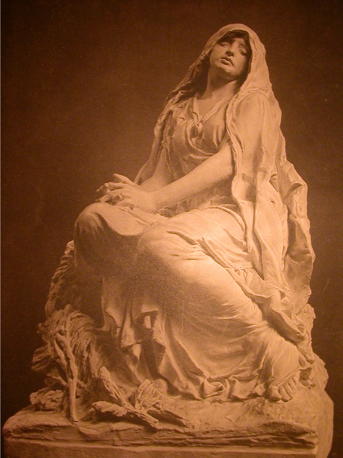 Grabdenkmal Holly: Josef W. Holly († 1892, Zentralfriedhof)